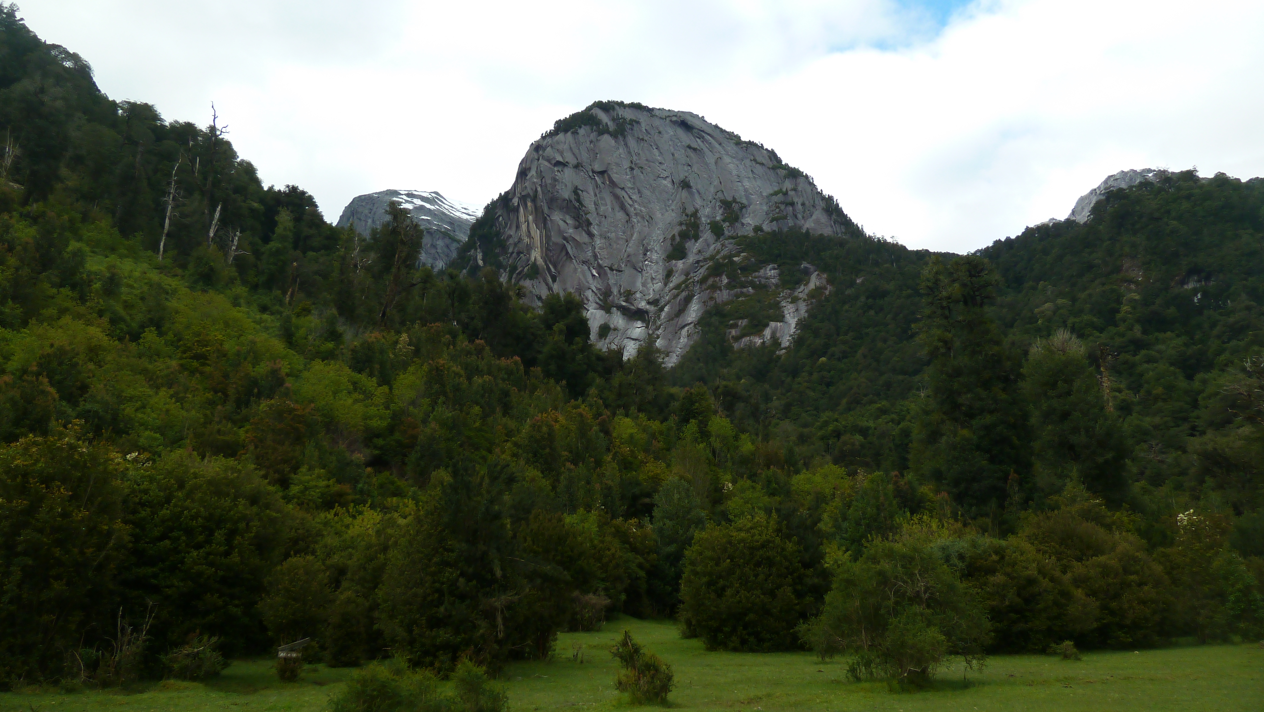 Cerro La Junta, Cochamó Valley, Chile.